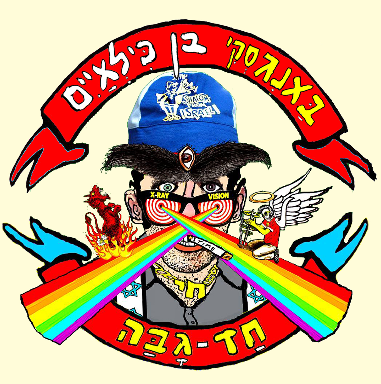 באנגסקי בן כלאיים